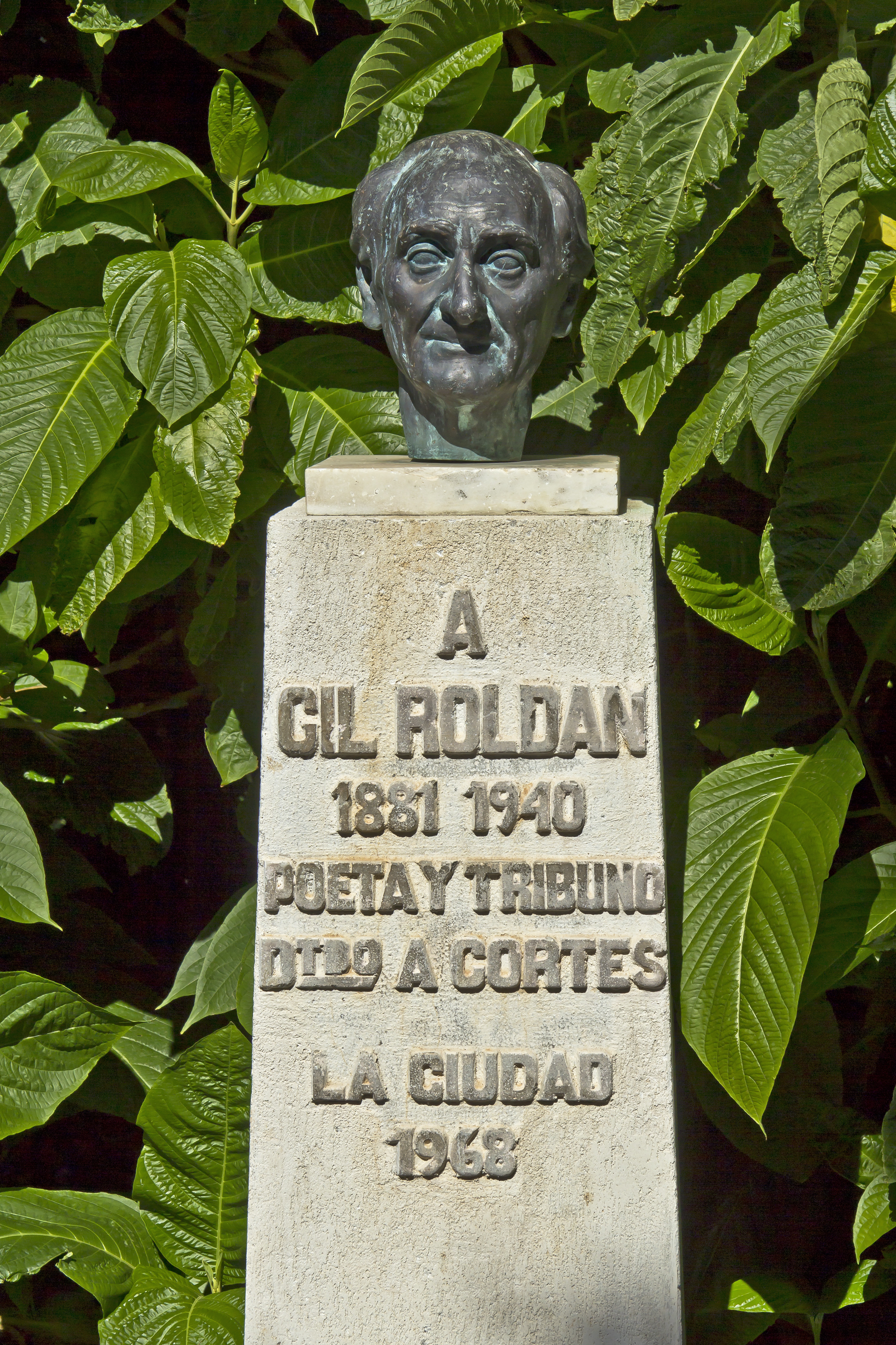 Das Denkmal für Ramón Gil-Roldán y Martín steht im Parque García Sanabria in Santa Cruz de Tenerife.